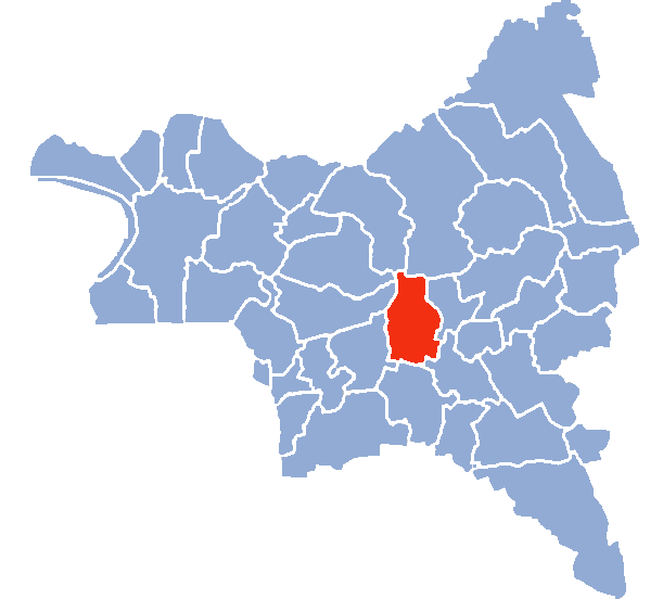 Auteur Hervé SUAUDEAU Licensing Catégorie:Cartes de Seine-saint-Denis Catégorie:Bondy